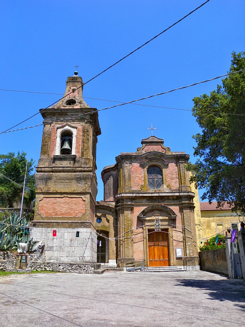 La Chiesa di San Gabriele Arcangelo sulla collina di Monteoliveto, Airola (BN), Italia